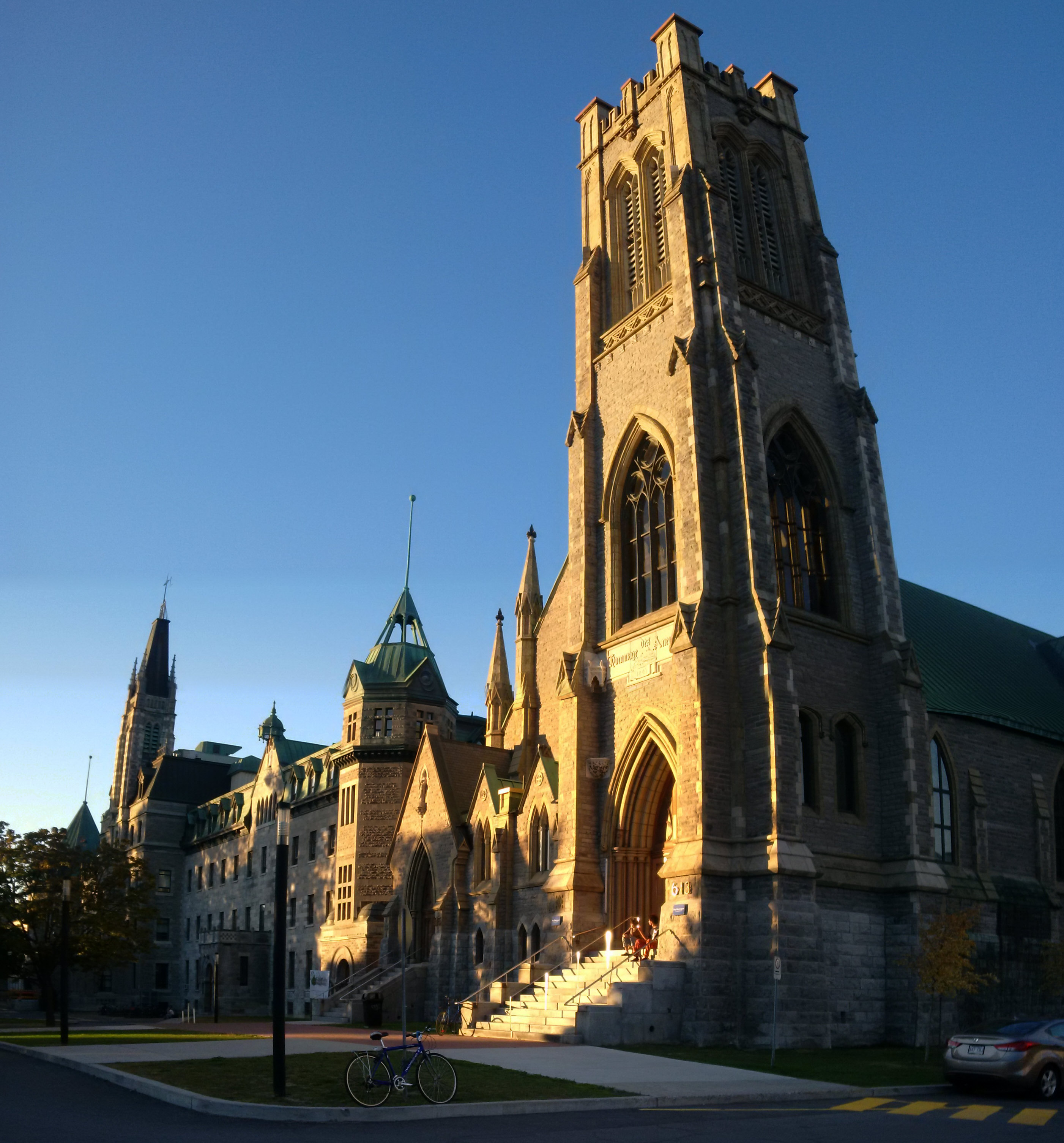 Vue d'ensemble sur le cégep Saint-Laurent. En avant-plan, le pavillon Émile-Legault.